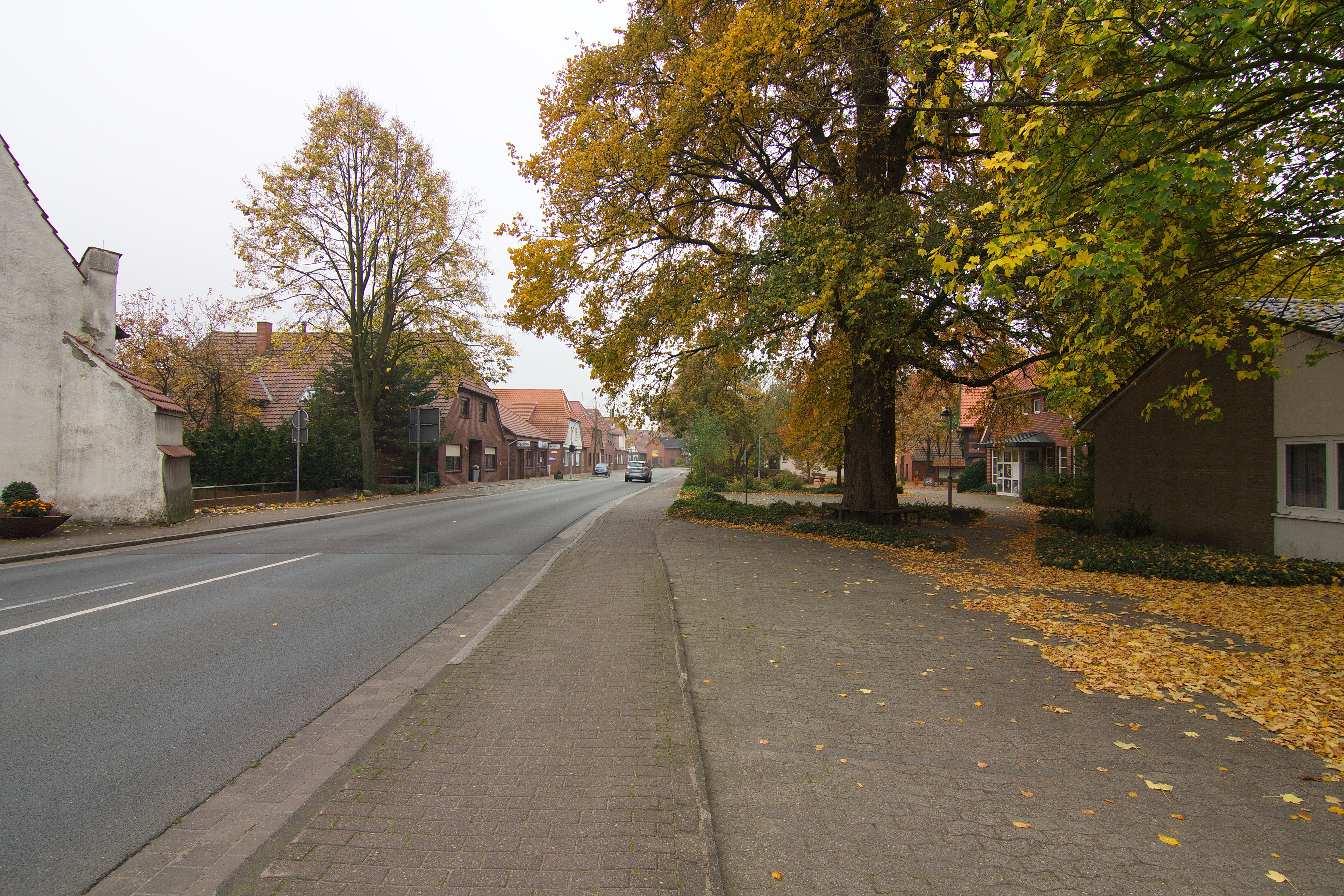 Die Gemeinde Barenburg gehört der Samtgemeinde Kirchdorf im Landkreis Diepholz, Niedersachsen, Deutschland an